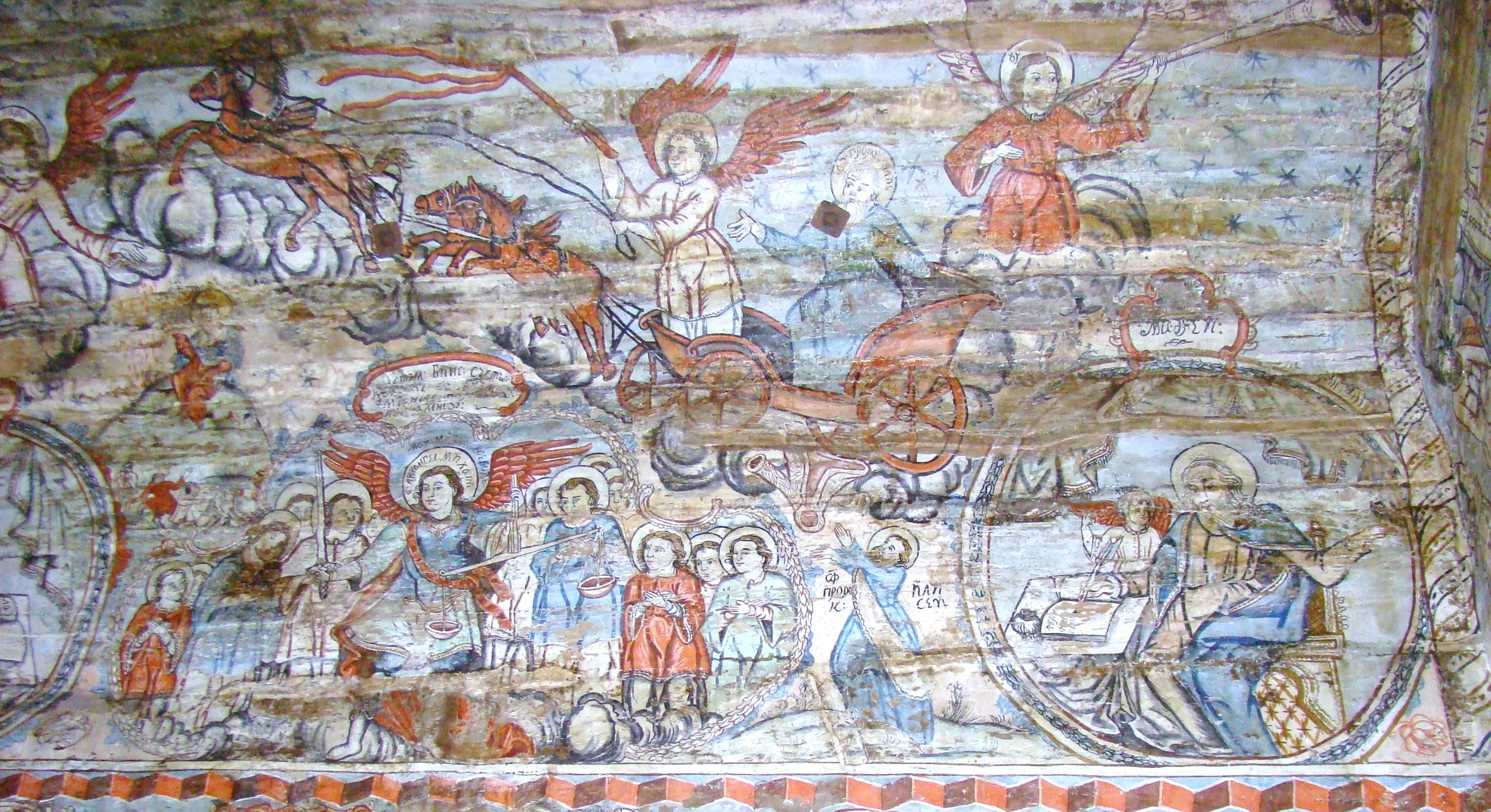 Biserica de lemn "Intrarea Maicii Domnului în Biserică" , sat BÂRSANA